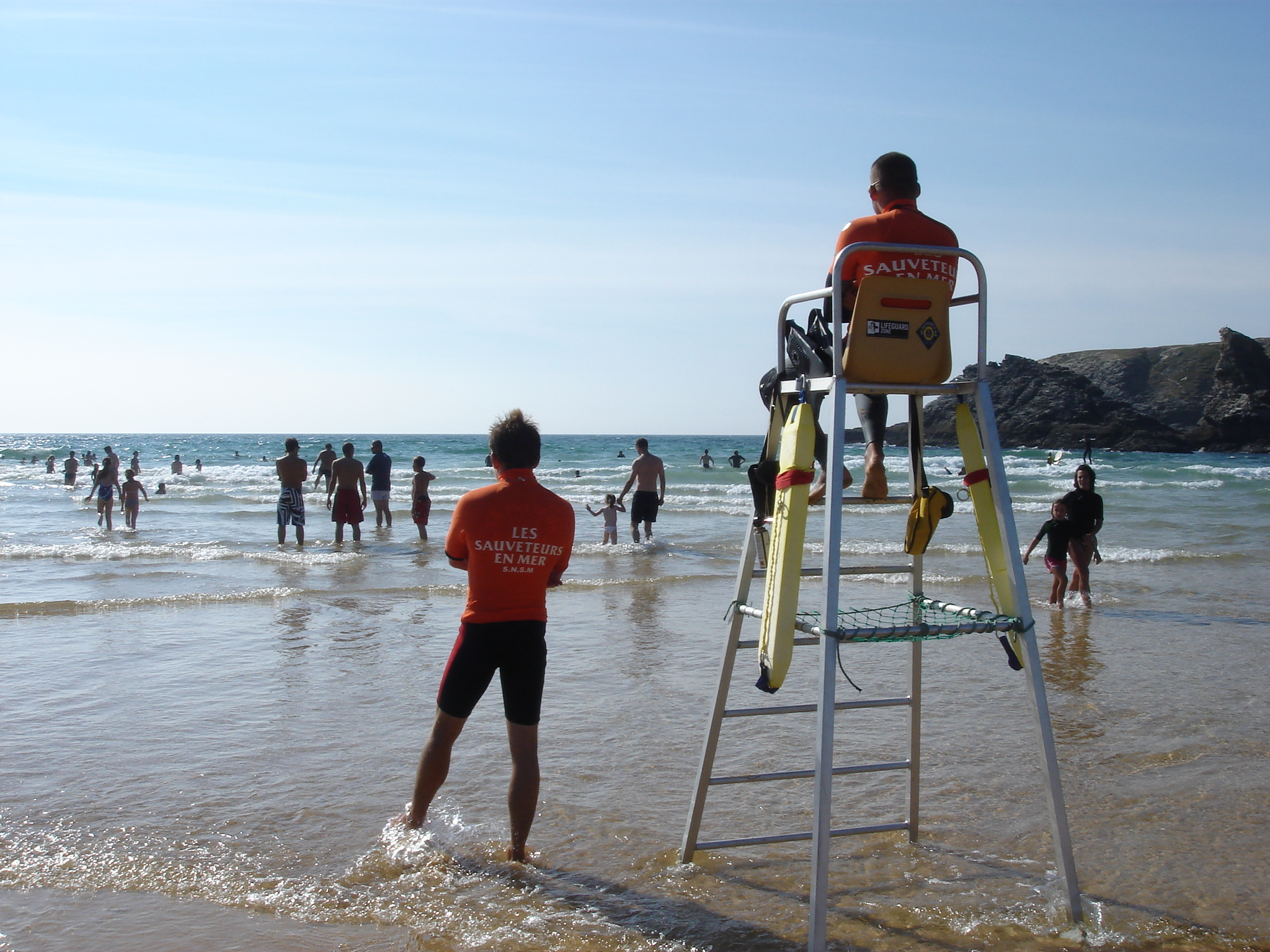 Baignade surveillée à la plage de Donnant, à Belle-île-en-Mer (56), en Bretagne. SNSM.